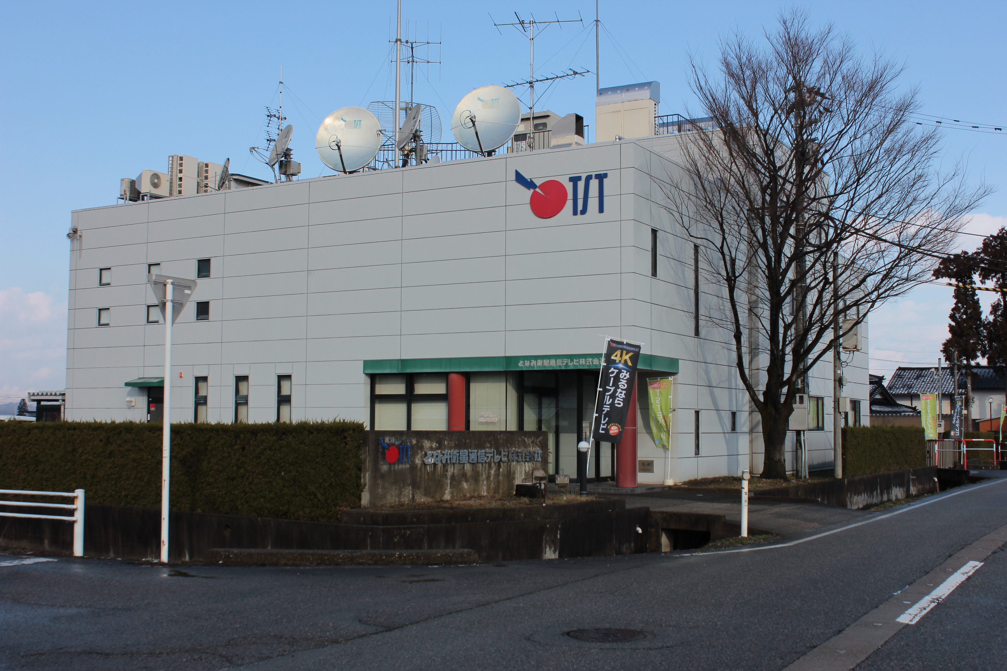 となみ衛星通信テレビ本社（富山県南砺市） Canon EOS Kiss X5